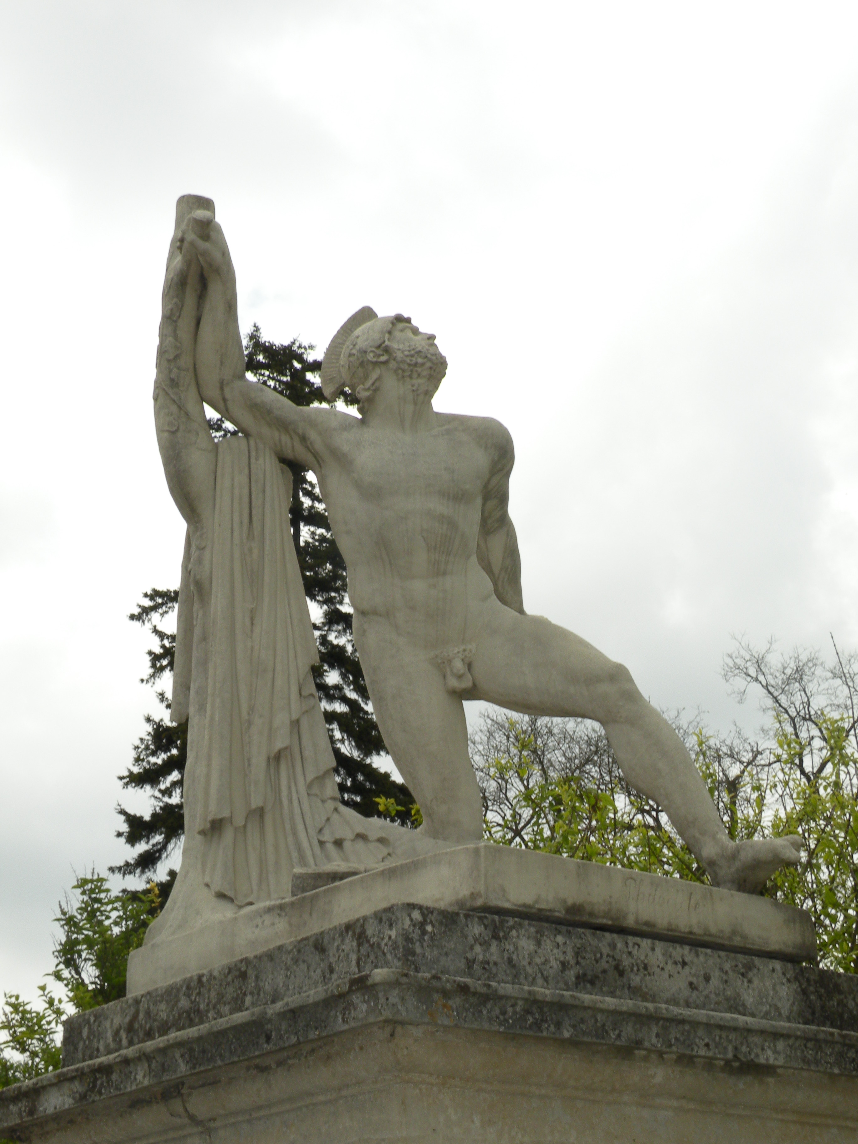 statue de Philoctète blessé de Louis Dupaty en 1810 exposé dans les jardin du chateau de compiègne